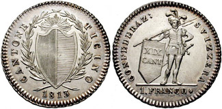 Switzerland, Ticino. 1813. AR Franco (7.47 gm). Bern mint (no star). Dated 1813. Civic coat-of-arms Soldier with pike and shield; 1 FRANCO* in exergue. Mintage of 5,920 pieces in two varieties. KM 3. Svizzera canton Ticino. 1813. AR Franco (7.47 gm). Zecca di Berna (senza stella). Datata 1813. Stemma cantonale SOldato con alabarda e scudo; 1 FRANCO* in esergo. Coniati 5,920 pezzi con due varietà. KM 3.